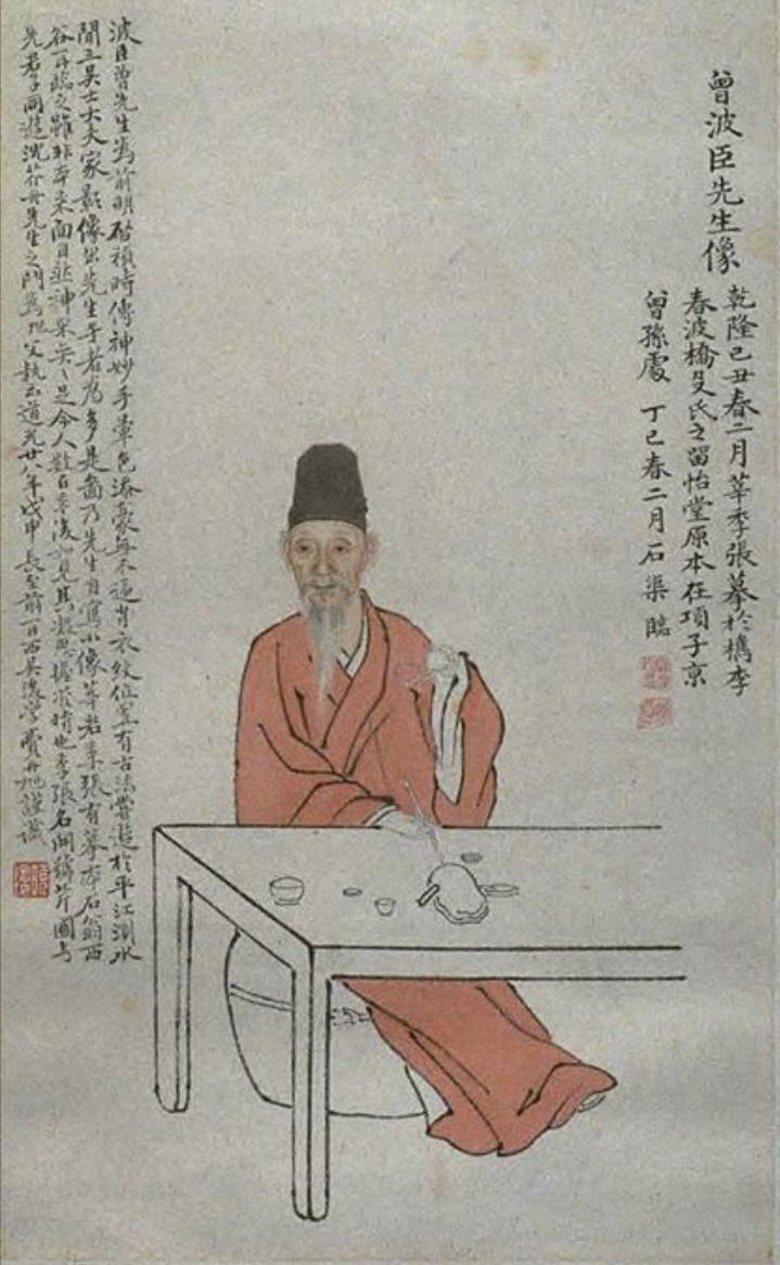 中文（台灣）: 曾鯨（1564年－1647年），字波臣，大明福建省莆田人，明朝後期畫家。